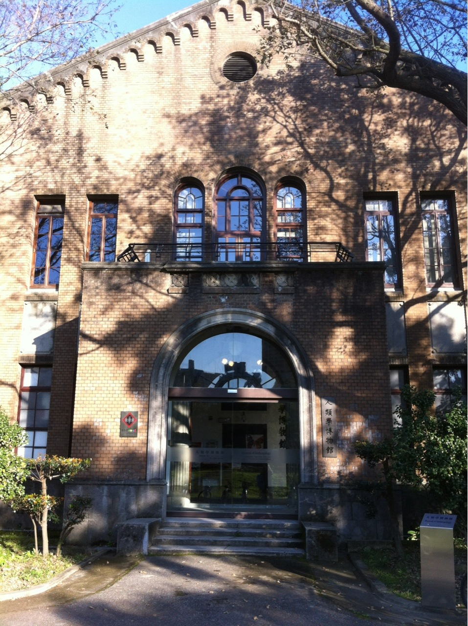 中文（台灣）: 台灣大學人類學博物館